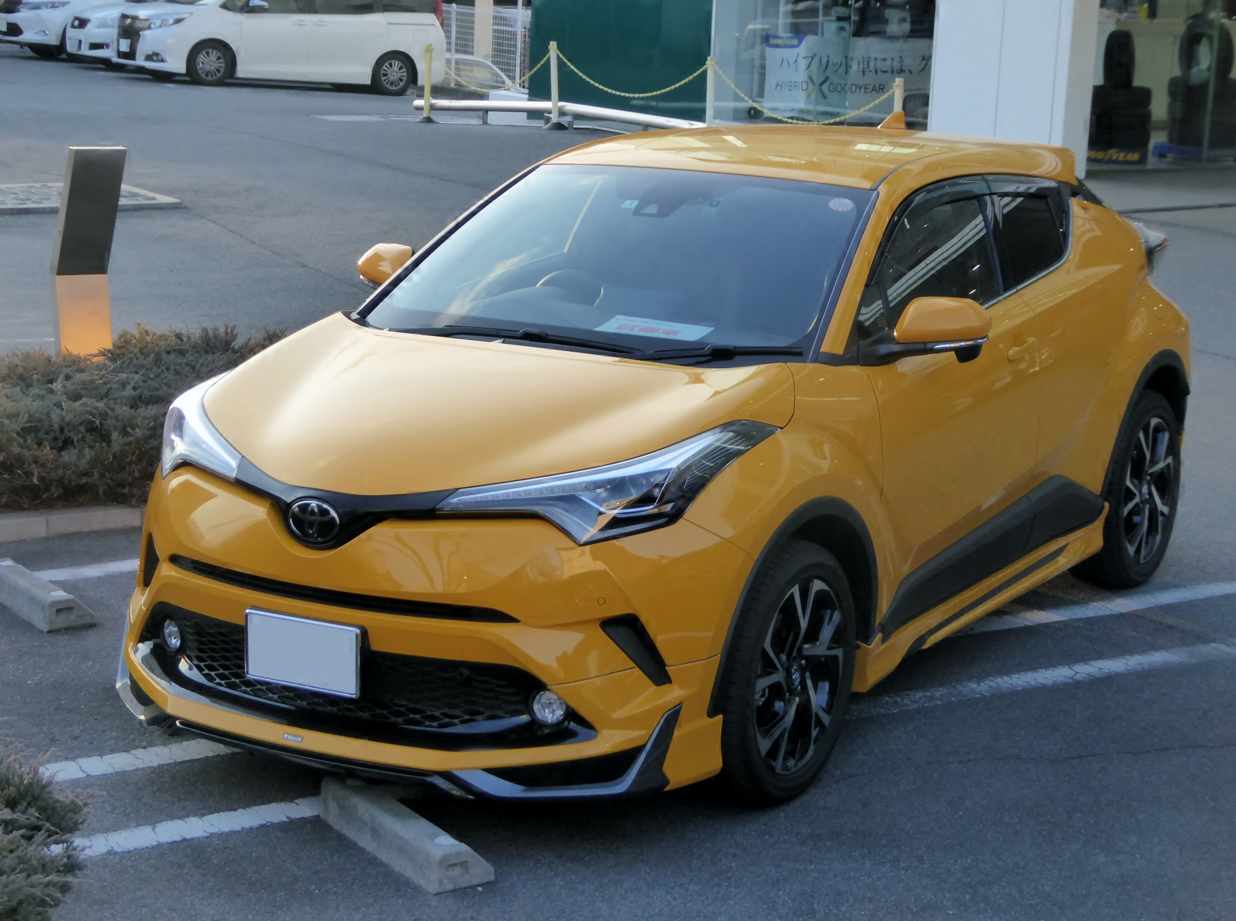 TRD製パーツを装着したDBA-NGX50-AHXEX型トヨタ・C-HR G-Tをフロントから撮影。